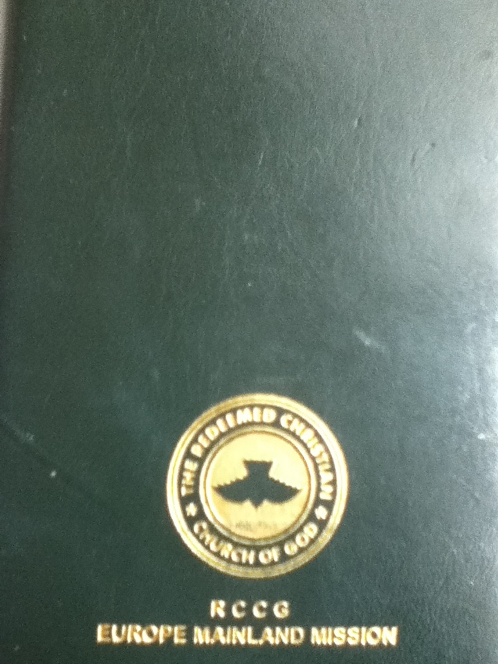 Ein Notizbuch der Reedemed Christian Church of God